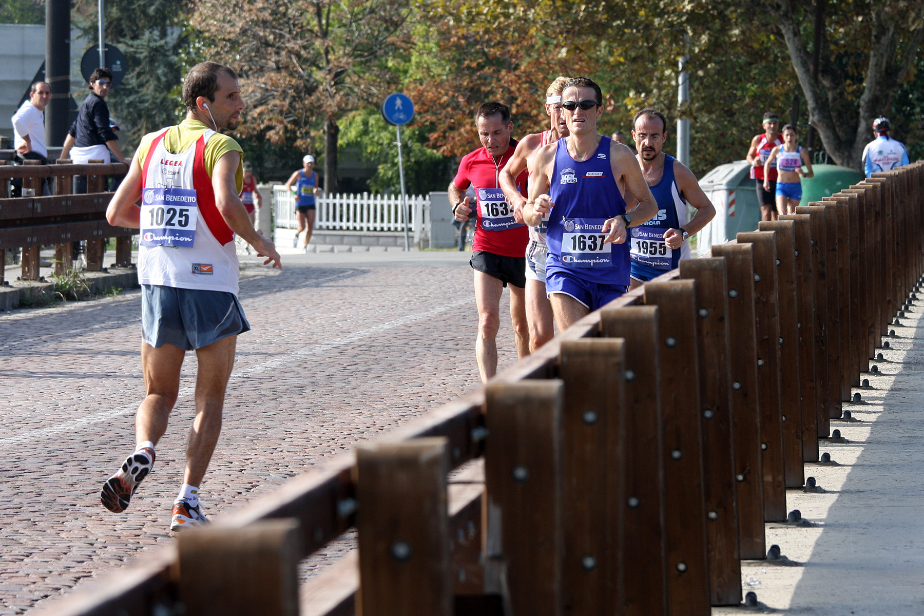 Maratona di Carpi